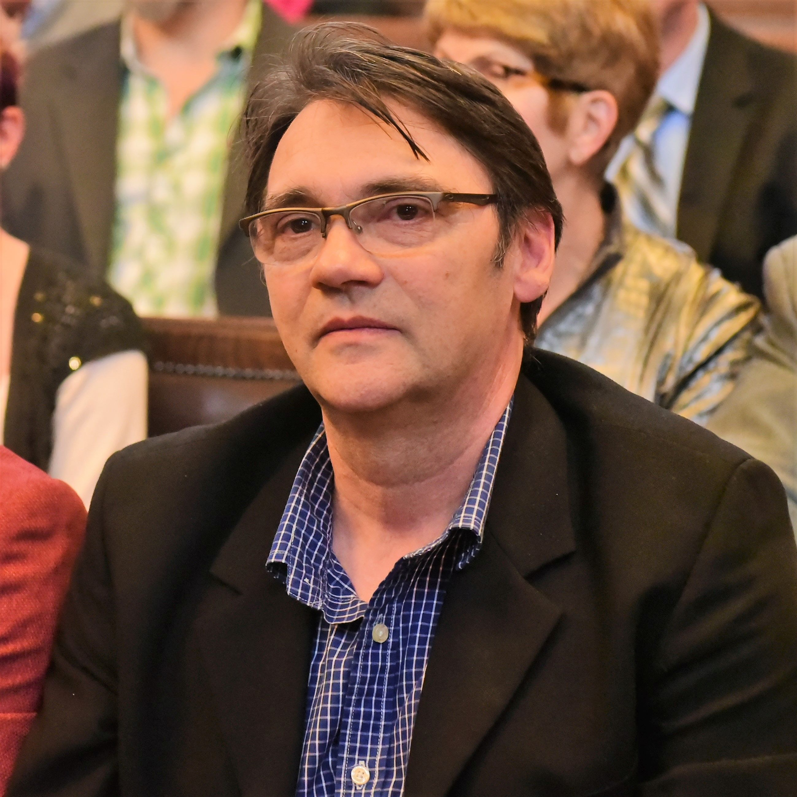 Kreisz Tibor világbajnok magyar asztaliteniszező